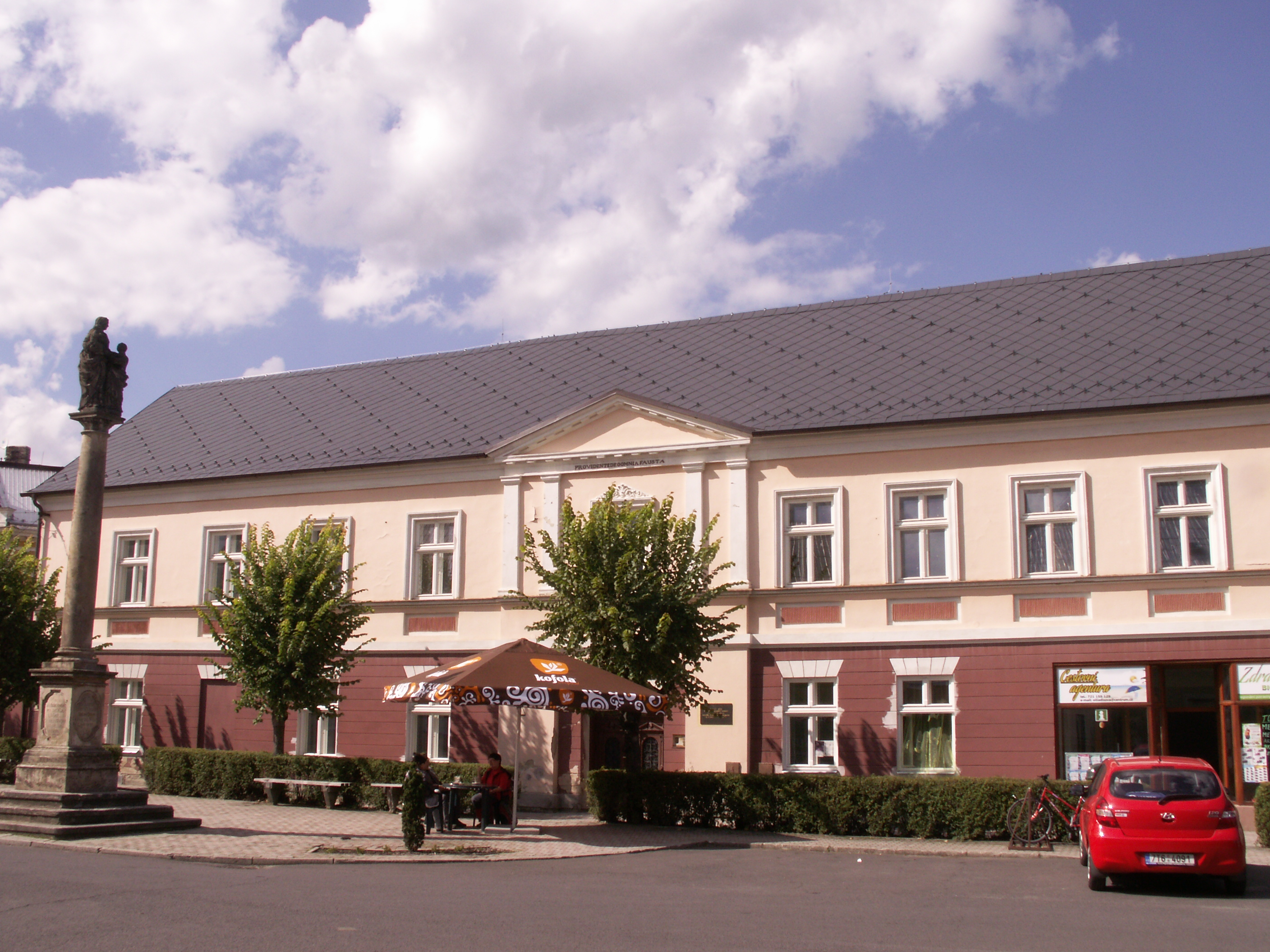 Město Albrechtice (okres Bruntál), rodný dům Františka Gela, náměstí ČSA